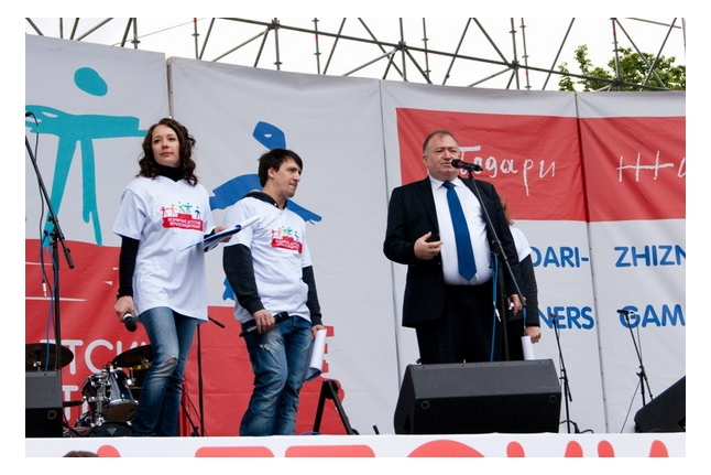 3-ія Сусветныя дзіцячыя Гульні пераможцаў